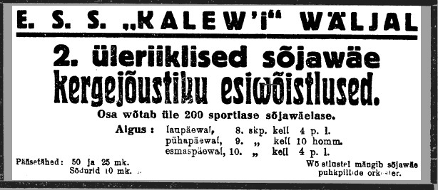 Kuulutus